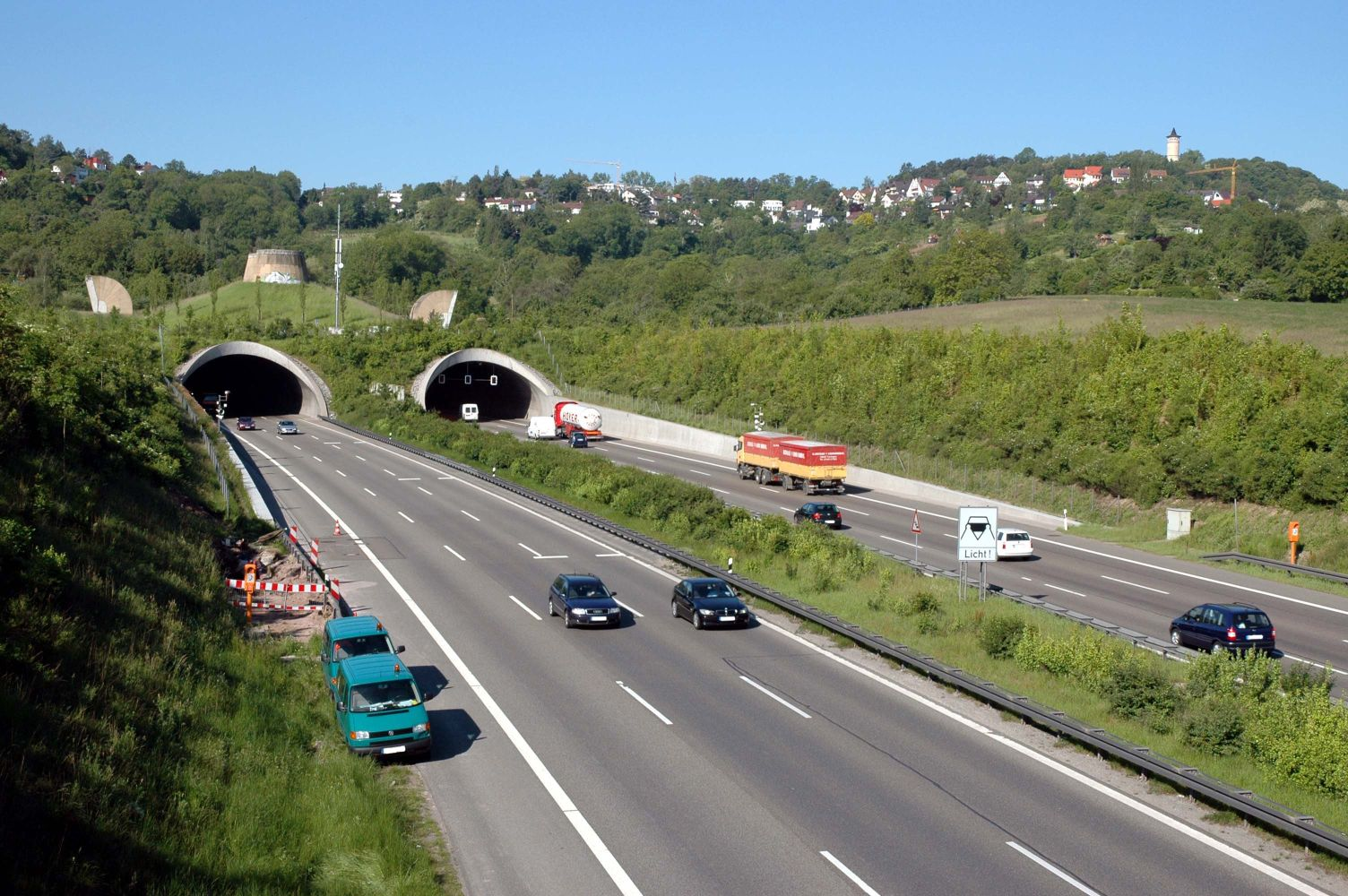 Nordseite des Engelbergs und Engelbergbasistunnel der A81.